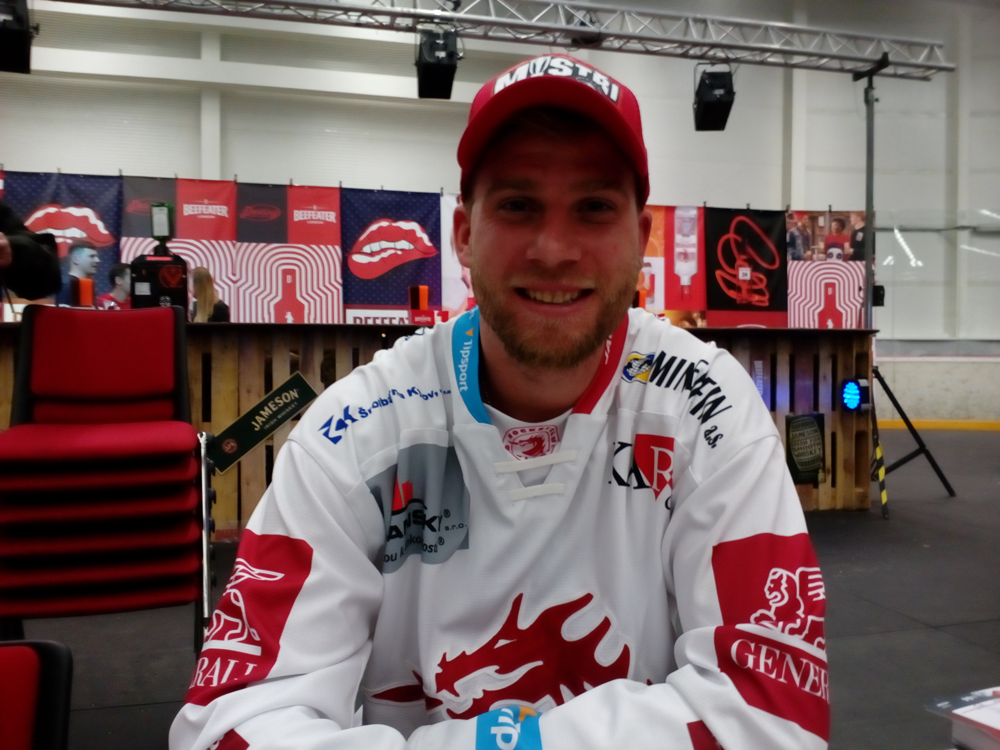 Po zakončení sezóny 2018/19 na autogramiádě v malé (tréningové) Werk Areně